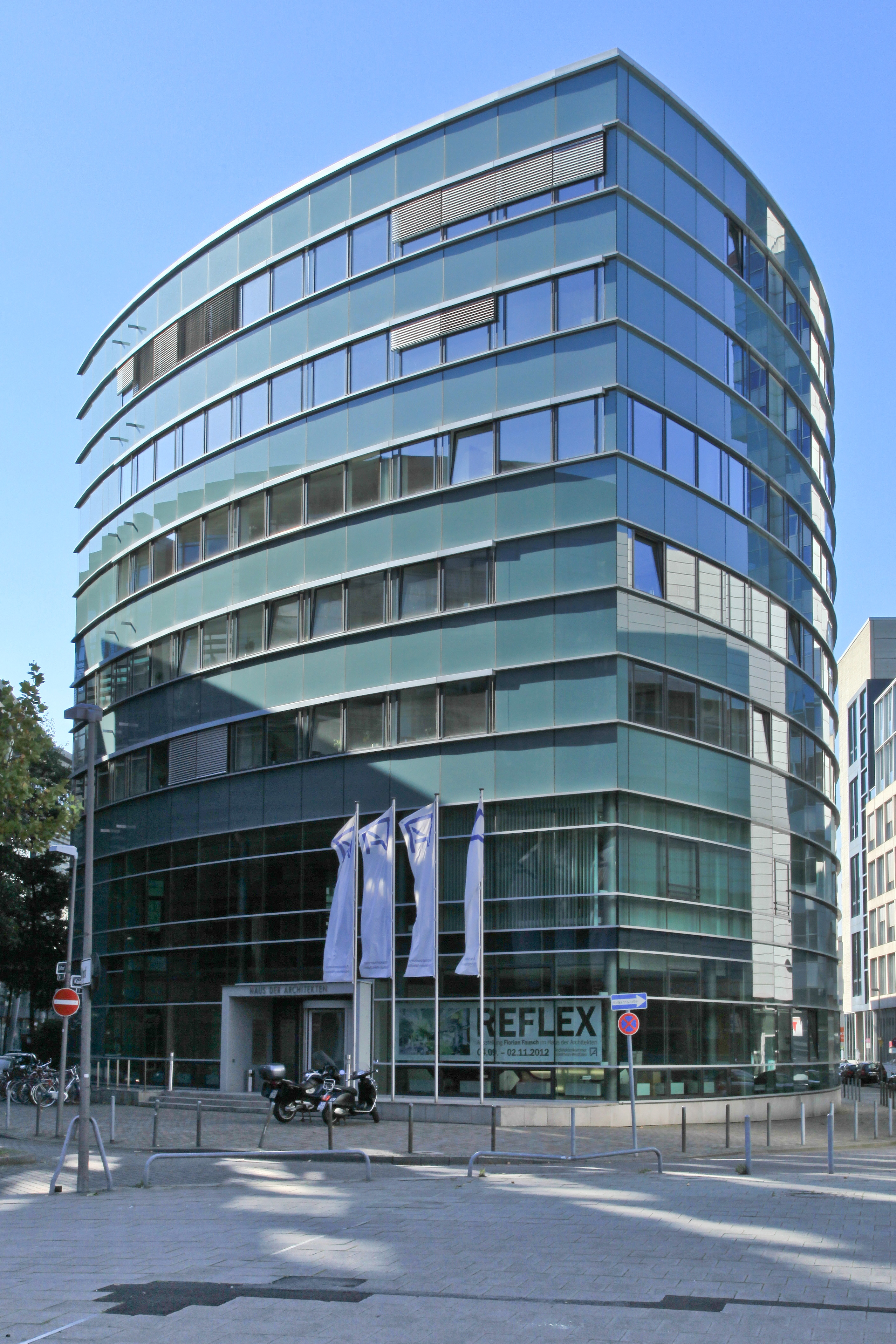 Haus der Architekten, Architektenkammer NRW, Zollhof 1 in Düsseldorf